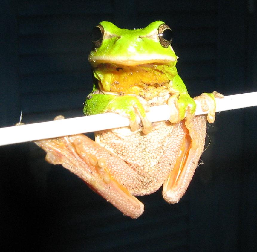 Rainette du sud de la France